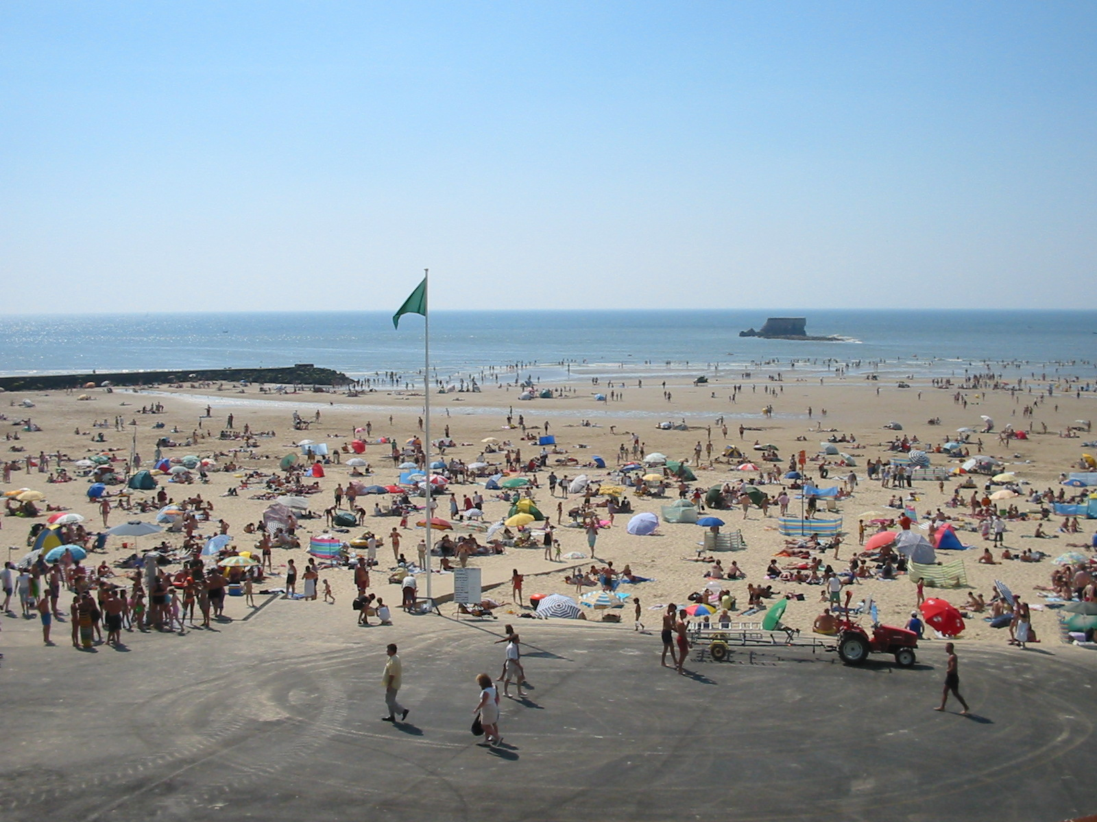 Descente de Plage - Le Portel - L'Epi, à droite, le Fort de l'Heurt en mer